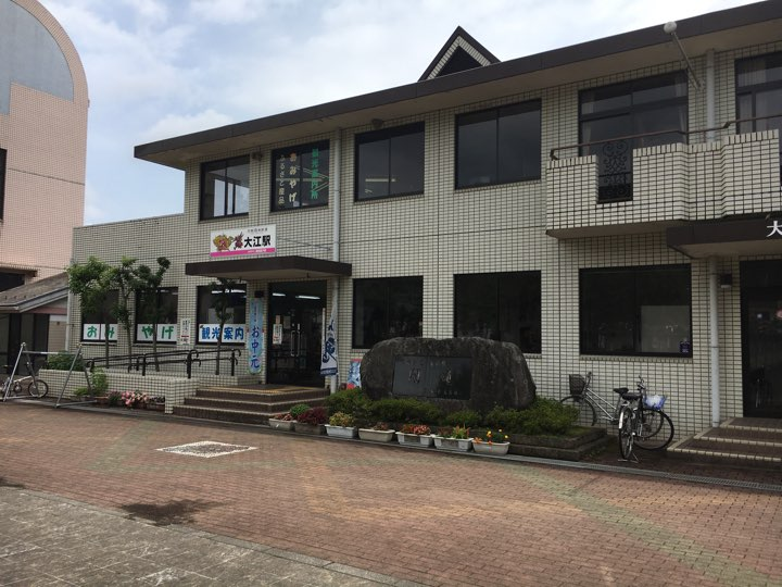 京都丹後鉄道・大江駅駅舎。2017年7月30日撮影。